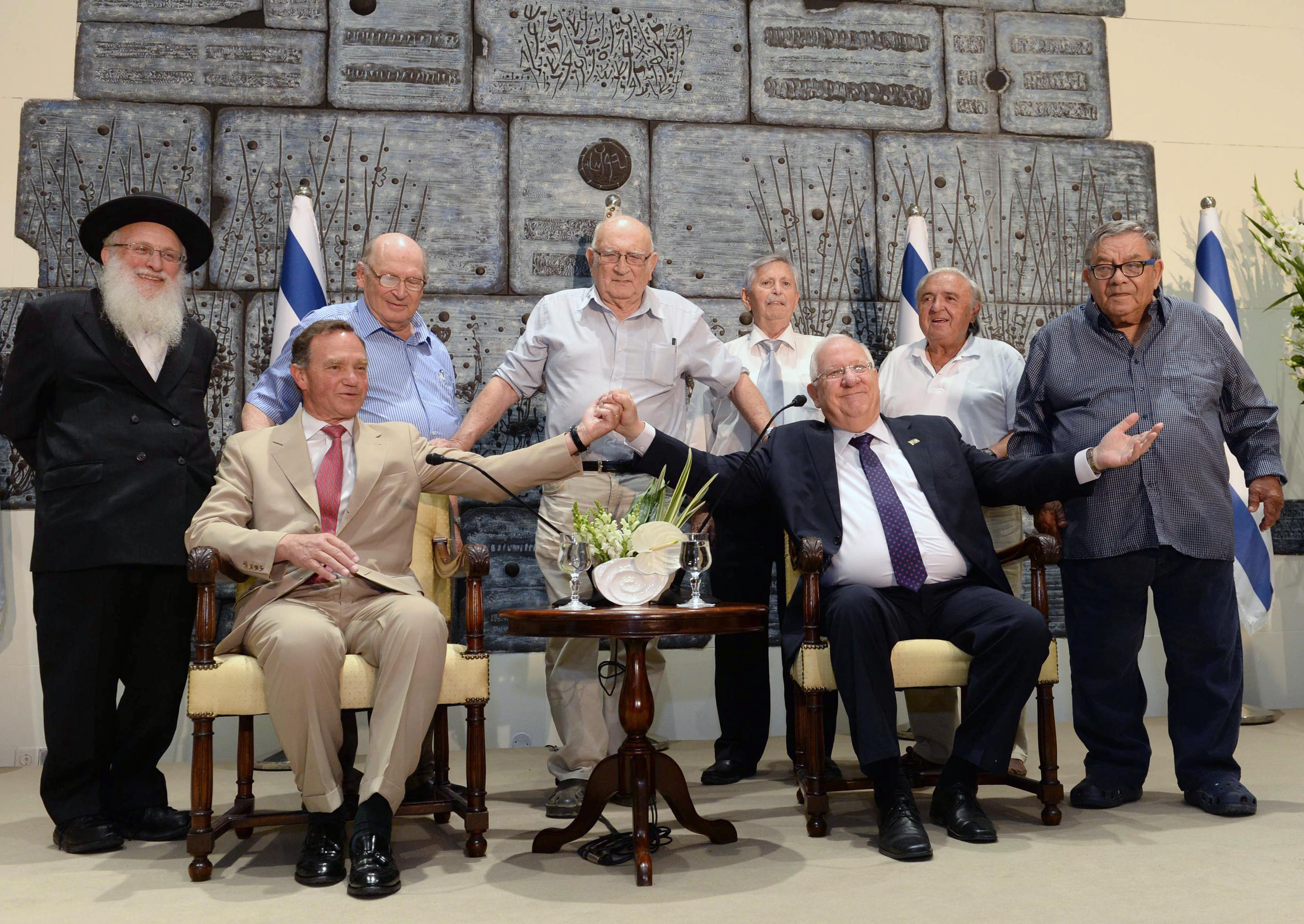 הנסיך מישל דה לינייה נכדו של איז'ן השני לבית לינייה חסיד אומות עולם, בפגישה בבית נשיא מדינת ישראל ראובן ריבלין עם ניצולי שואה בתמונה עם אברהם ברומברג, אלברט רסימורה, אברהם סביון, אברהם קפוטקה, יצחק ירושלמי ואפרים אלקוכן. שניצלו על ידי סבו